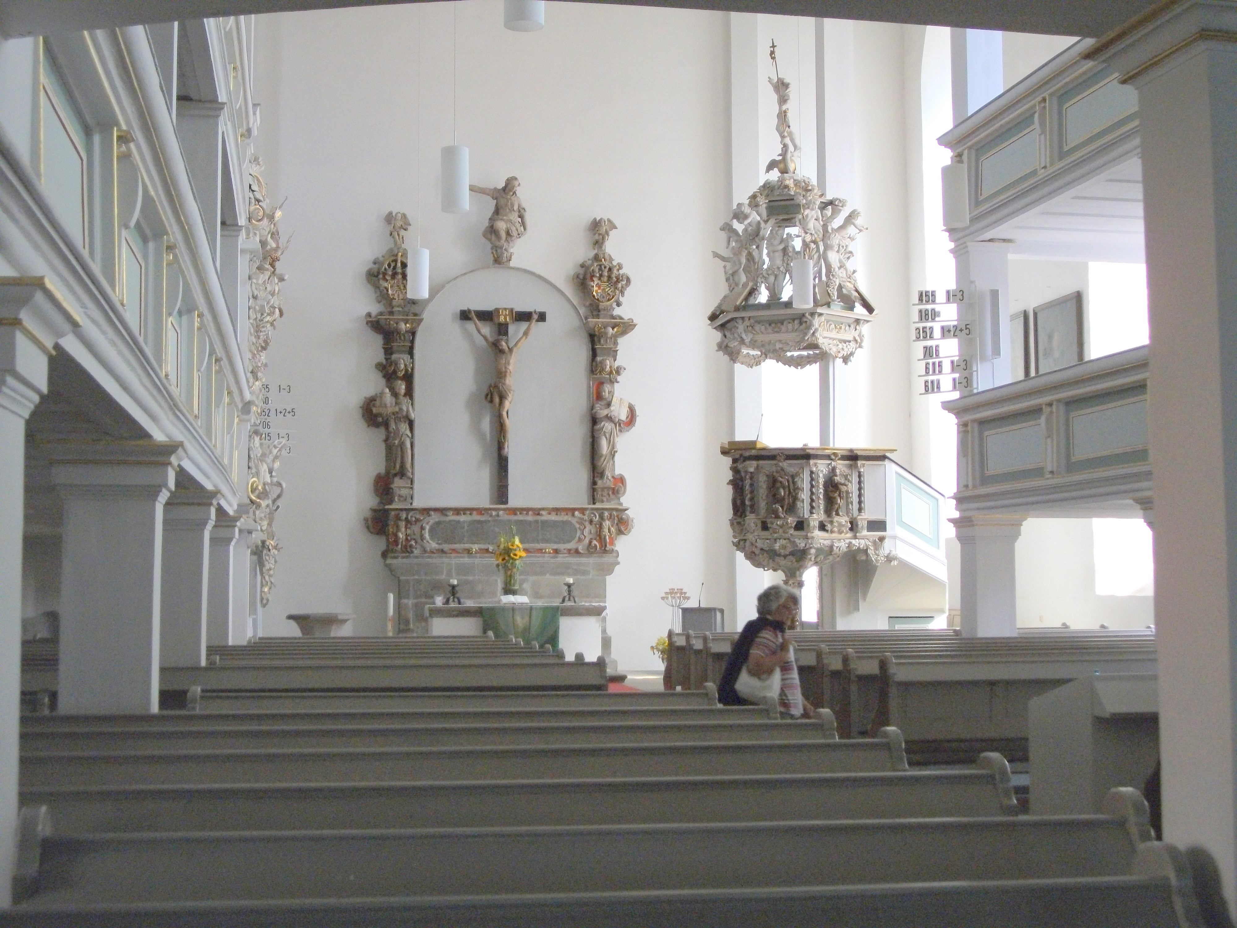 Blick auf Altar, Kruzifix und Kanzel in der Augustinerkirche Gotha